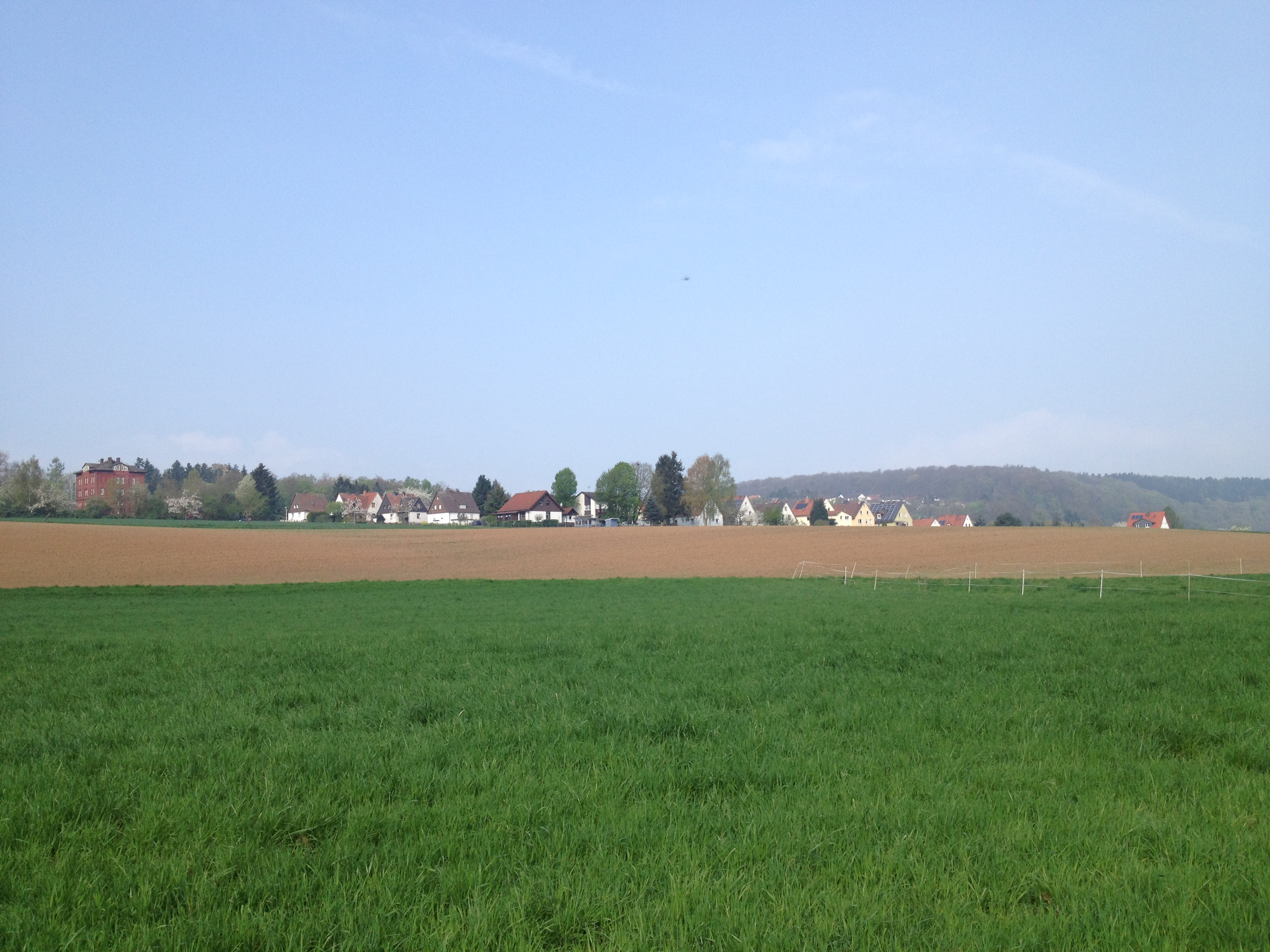 Eco Pfad Kulturgeschichte Guntershausen, Kassel-Steig, Fulda-Radweg